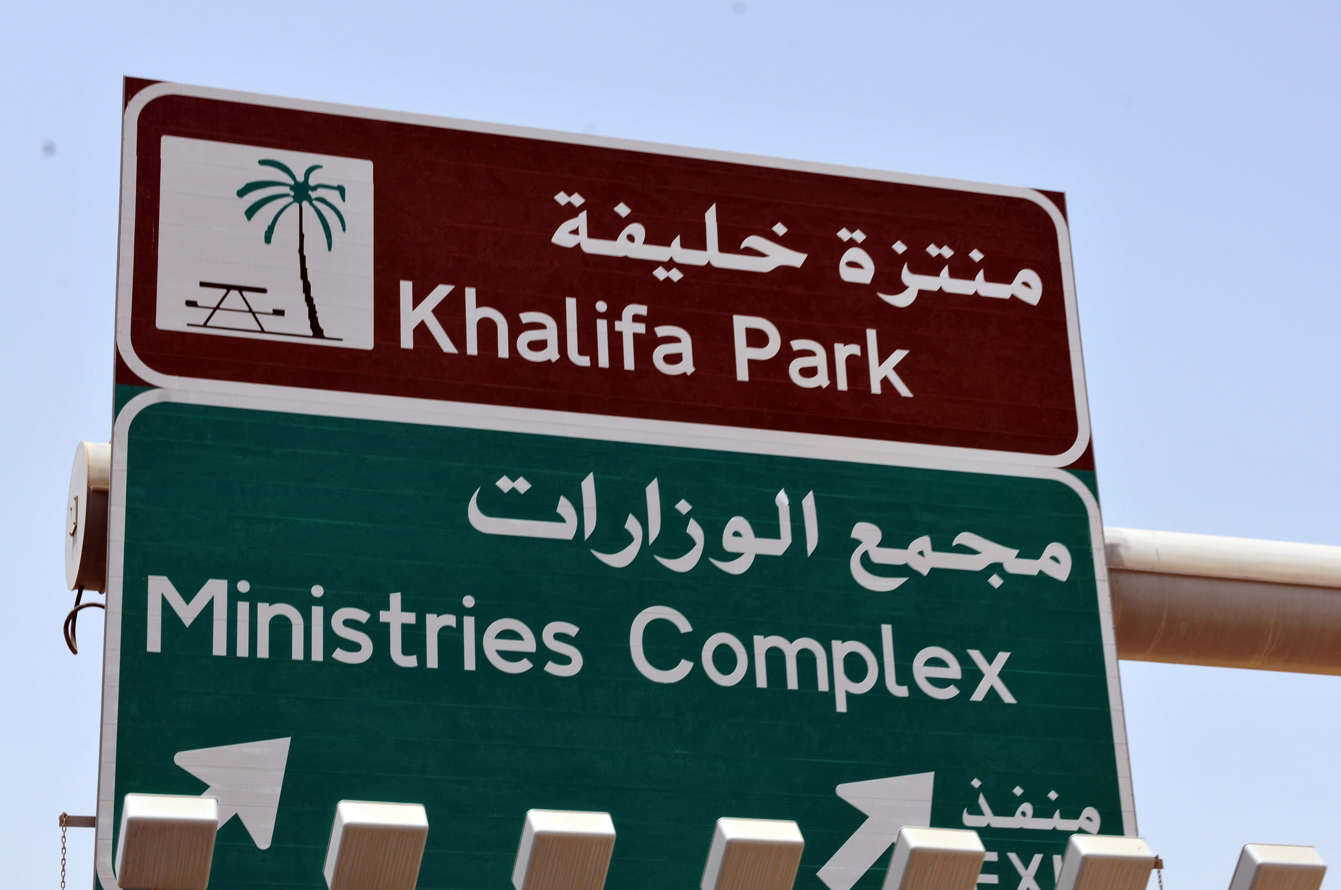 Wikimania 2013 Hongkong; Zwischenstop Abu Dhabi